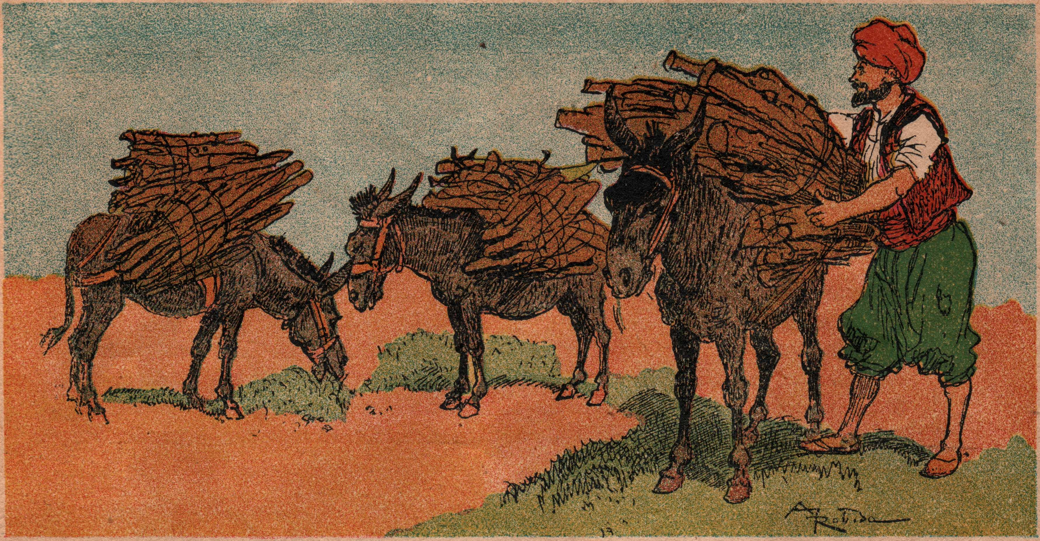 Illustration par Albert Robida du livre Ali-Baba et les quarante voleurs